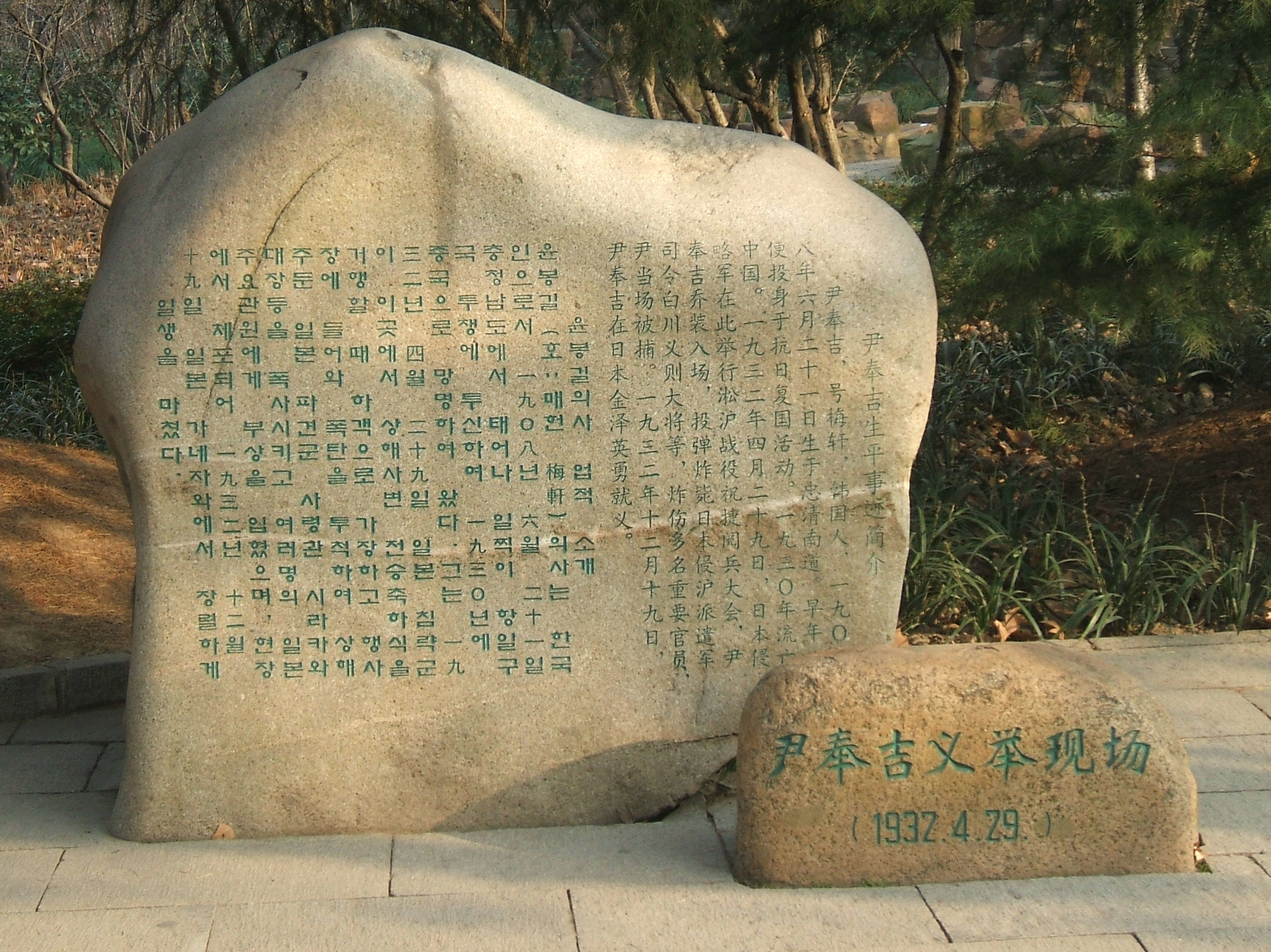 中華人民共和国上海市の魯迅公園にある虹口公園爆弾事件の記念碑